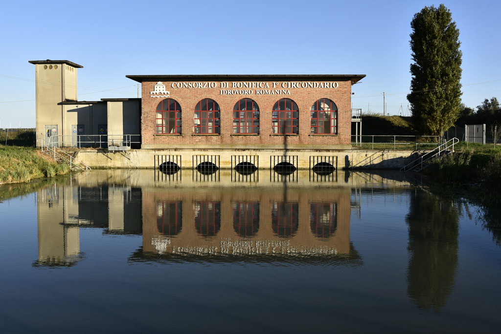 Goro (exact place) La Romanina/La Ghetti This is a photo of a monument which is part of cultural heritage of Italy.